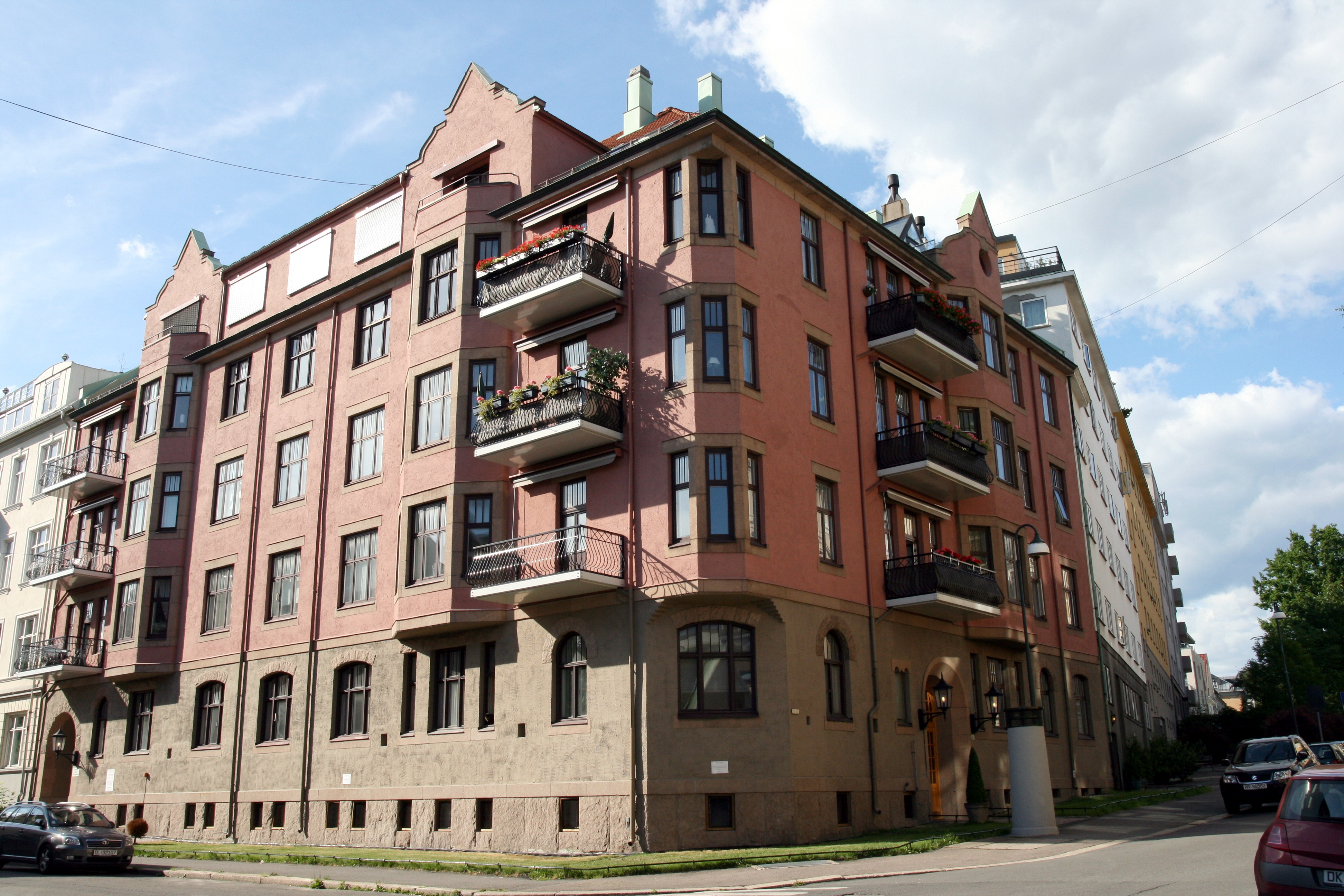 Bjørn Farmanns gate 12 på Skillebekk i Oslo.